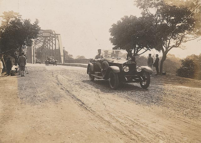 中文（台灣）: 裕仁太子於西元1923年（大正12年）抵台的第二天，從總督府（今總統府）出發，經過敕使街道（中山北路）和明治橋（今圓山橋），前往參拜具有帝國象徵的台灣神社時所拍攝的畫面。